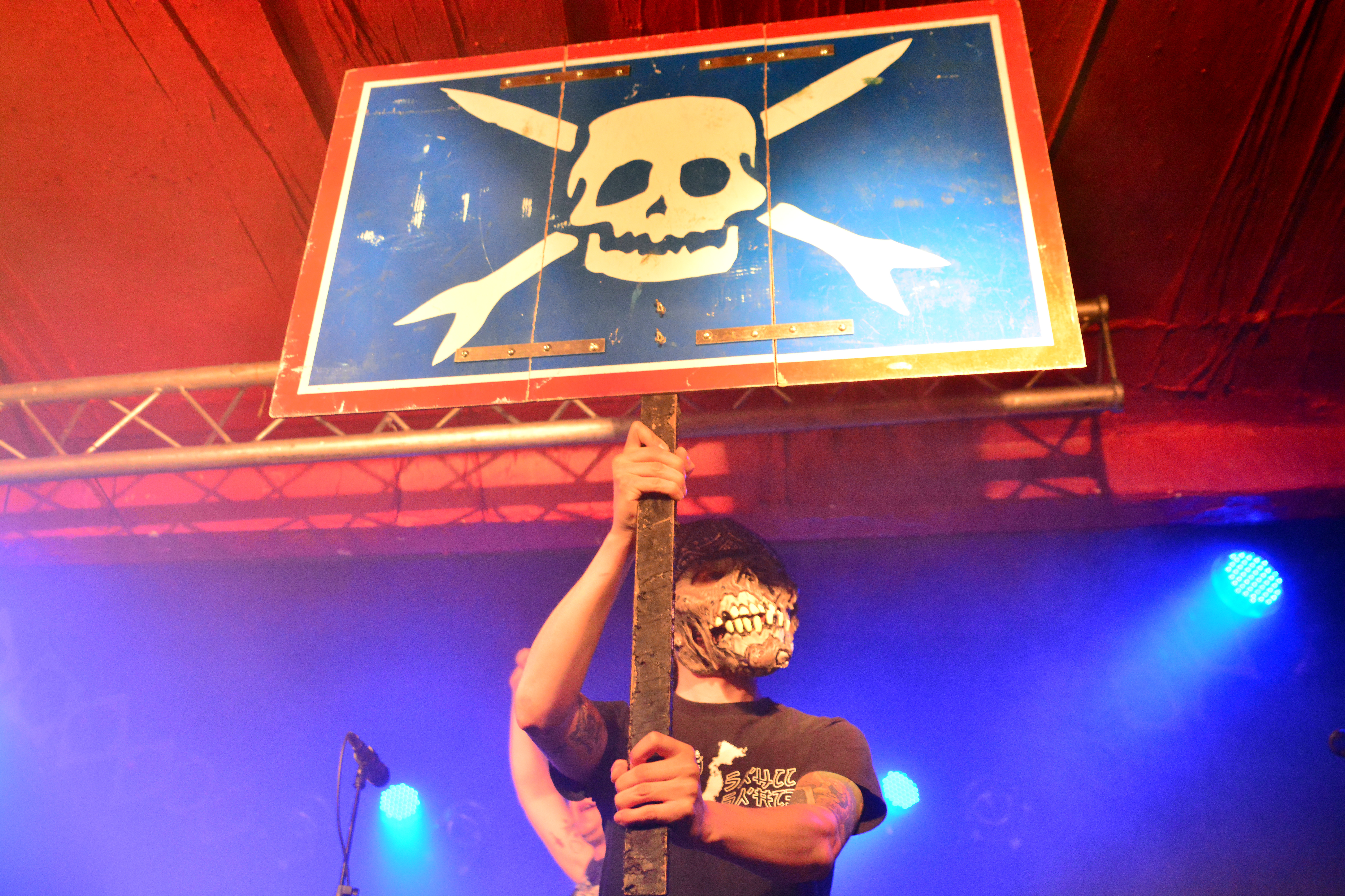 Teenage Bottlerocket beim Pirate Satellite Festival 2015 in der Hamburger Markthalle